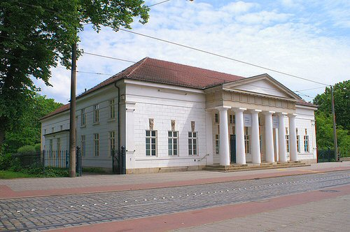 Bremen Wilhelm Wagenfeld Haus